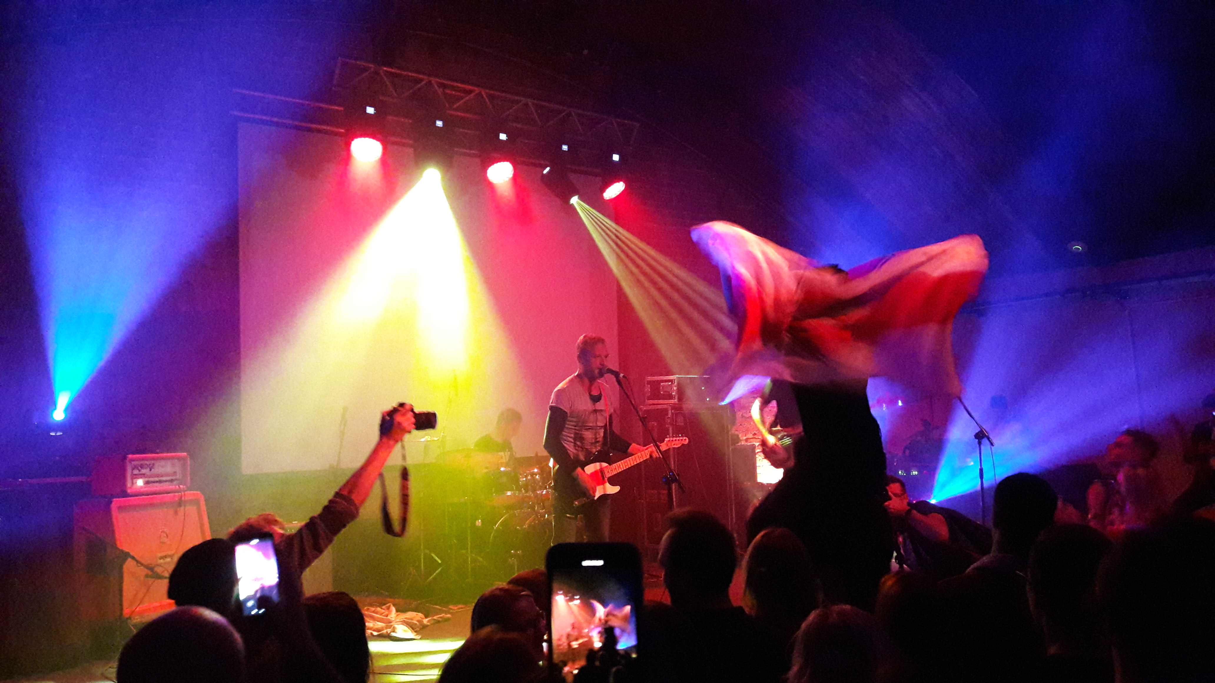 Białoruski zespół punk-rockowy Daj Darohu! podczas występu na koncercie "Solidarni z Białorusią 2019" 26 października 2019 roku w Warszawie.